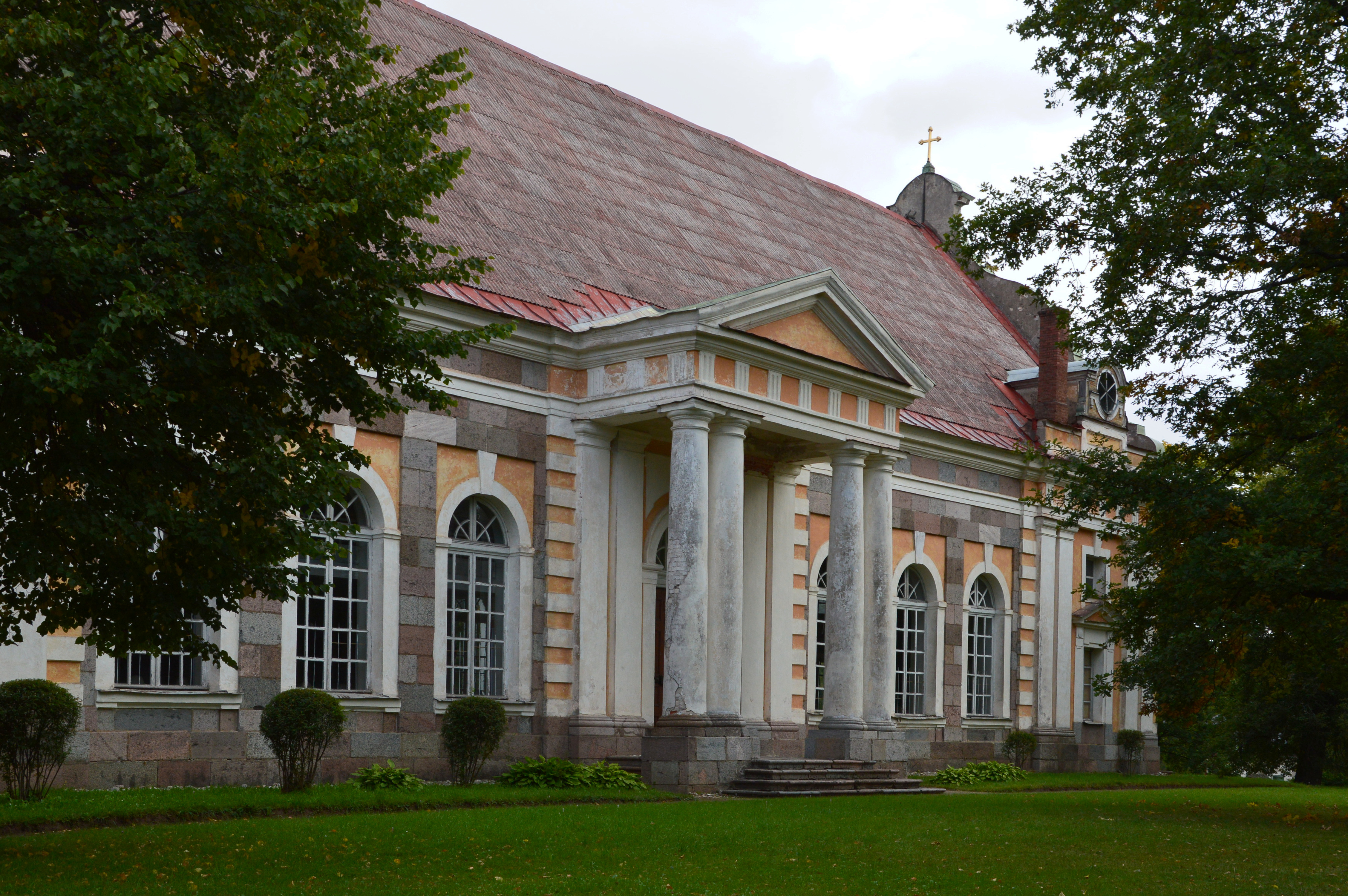 Alūksne luteri kirik küljelt